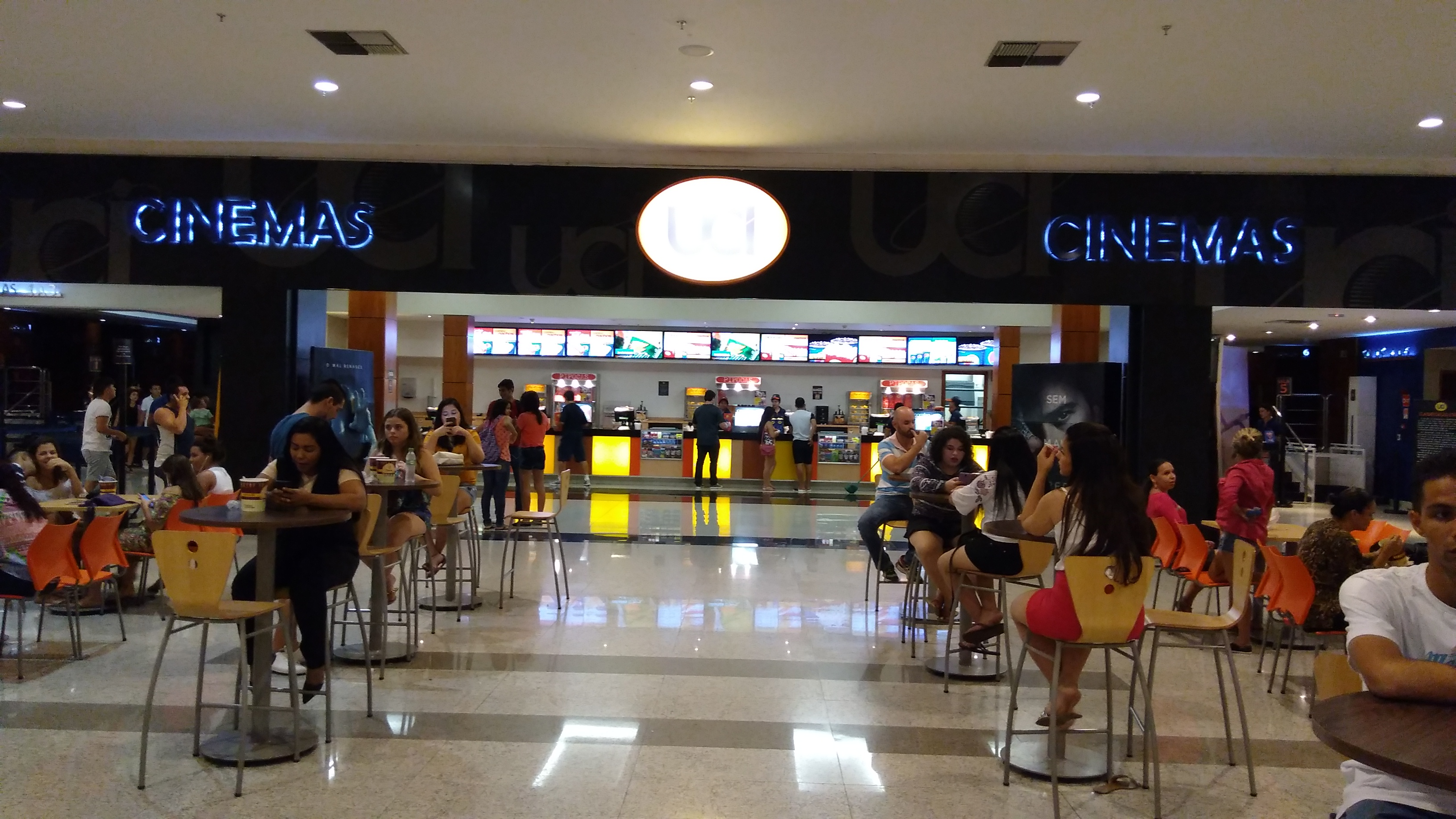 Área externa do UCI Shopping Parangaba de Fortaleza, CE